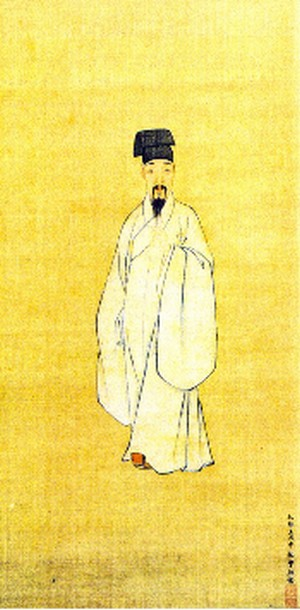 Portrait de Zhang Qingzi, rouleau mural, encre et couleur sur soie, 1622. 111,4x36,2cm. Musée provincial du Zhejiang, du peintre chinois Zeng Jing, 1564-1647.